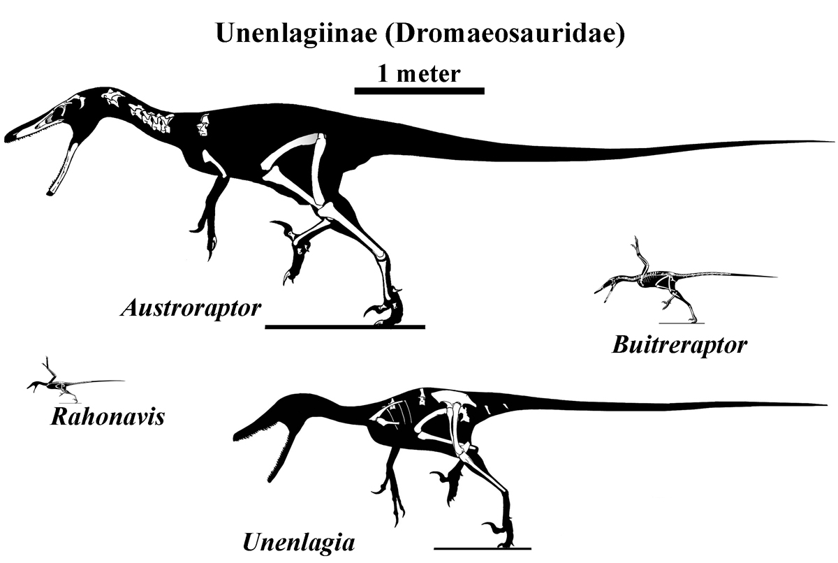 Unenlagiinae skeletons to scale.